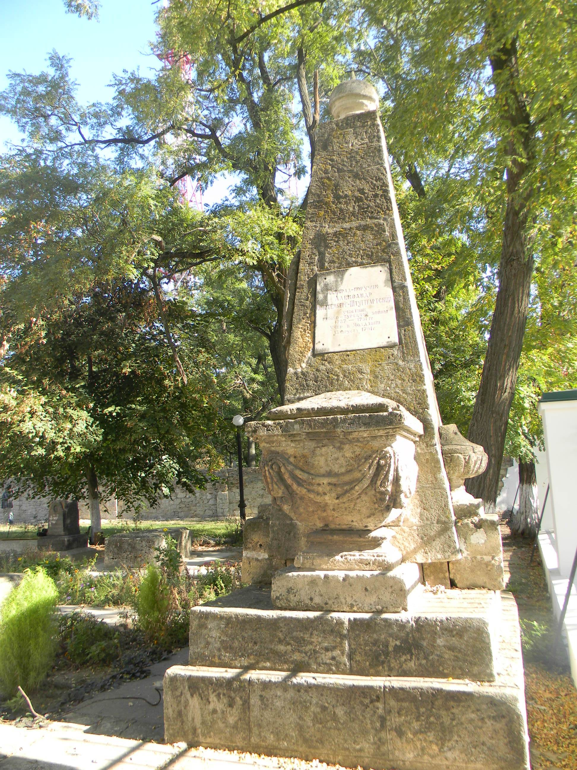 Комплекс поховань на території Катерининського (Спаського) собору, Херсон, вул. Перекопська, 13